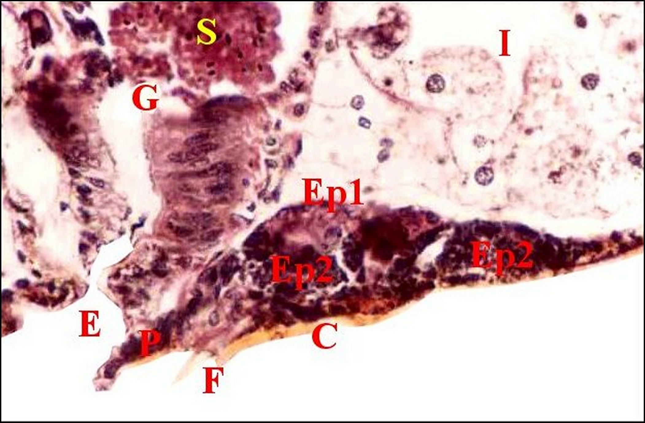 Région épigastrique et glandes prégonoporales de Pityohyphantes phrygianus, coupe histologique